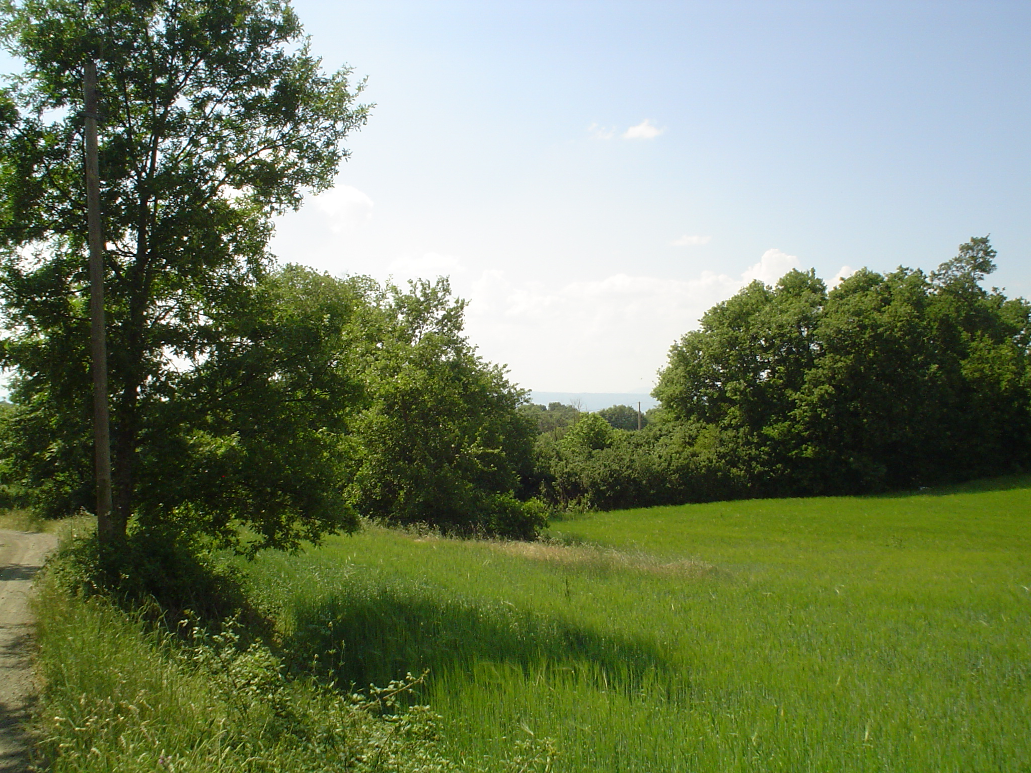 Vegetazione della Provincia di Viterbo